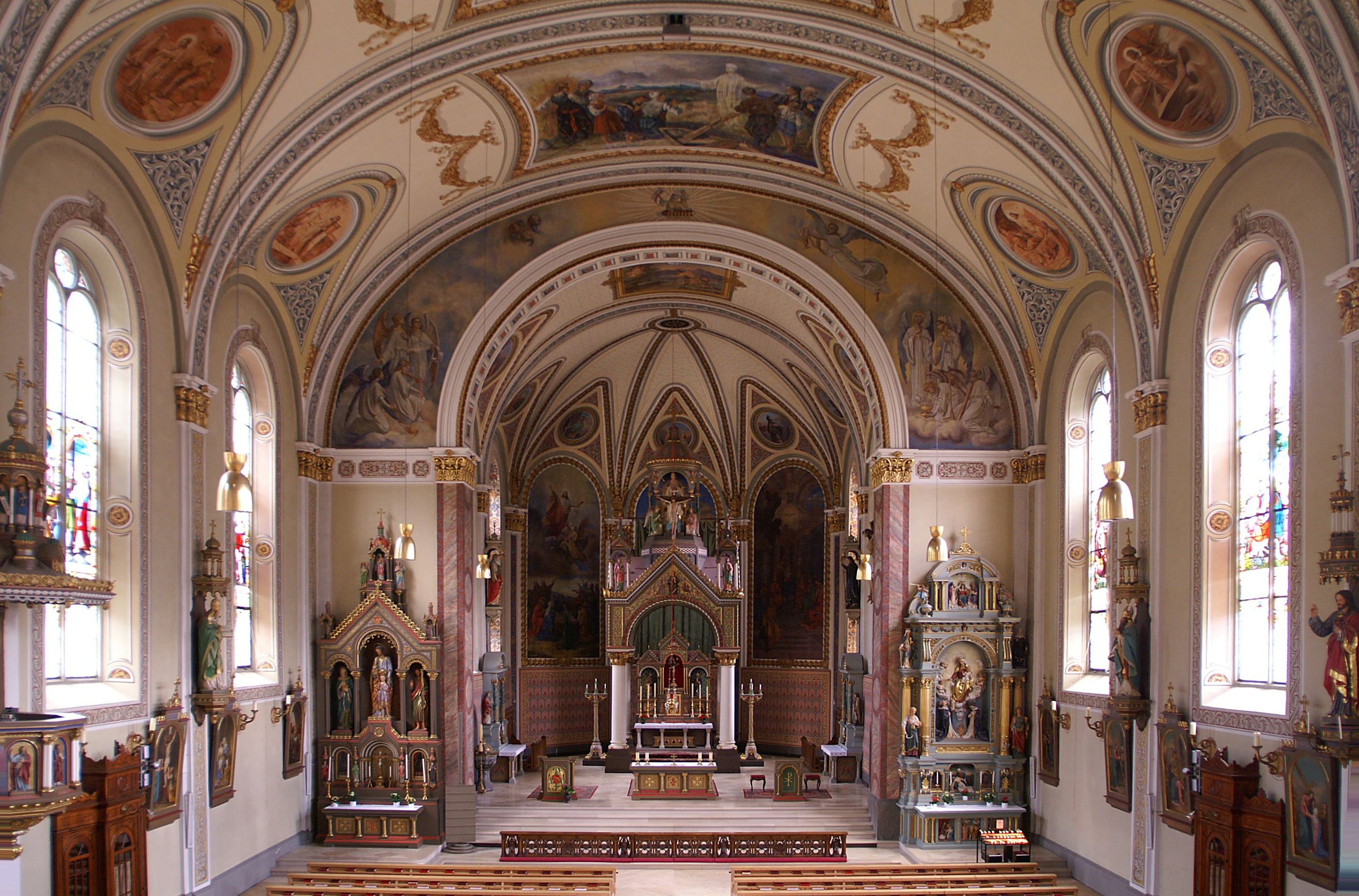 Pfarrkirche St.Jodok in Schruns, Montafon